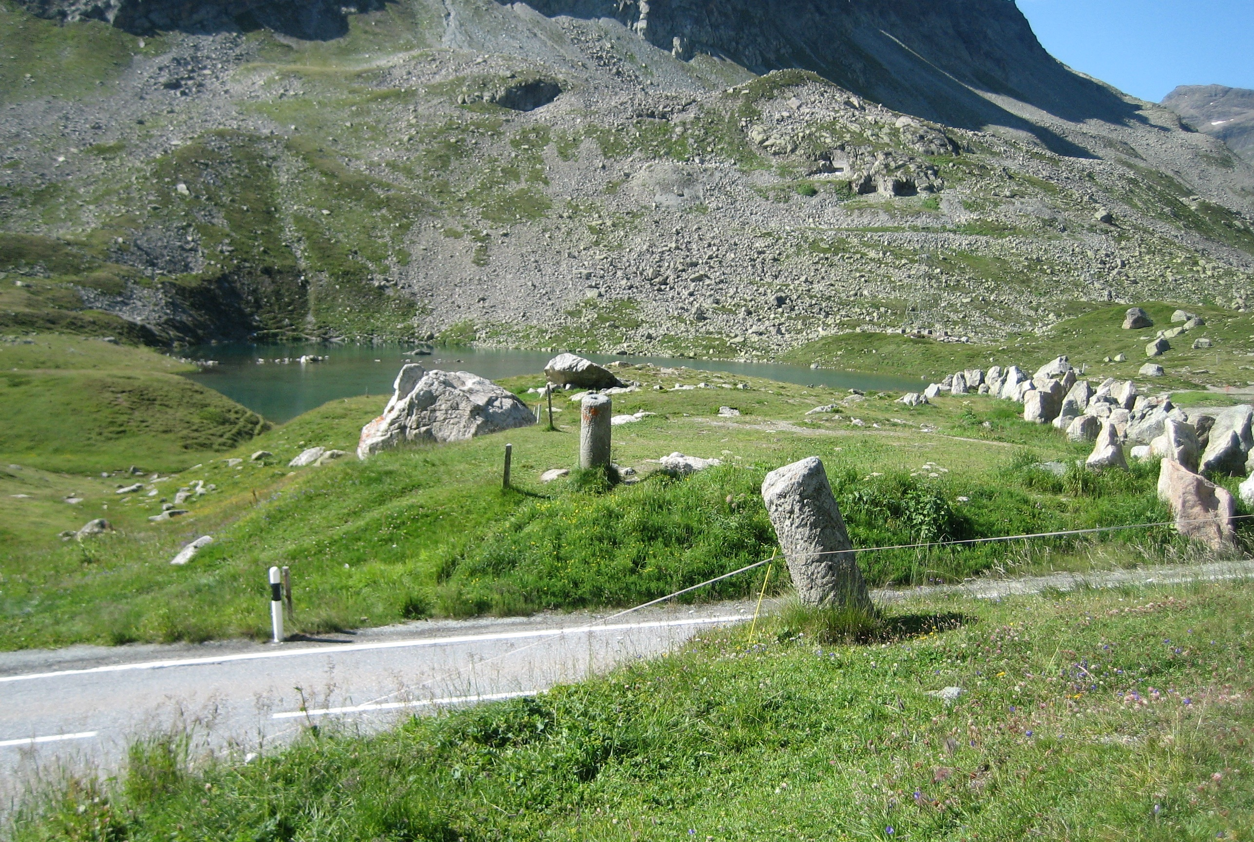 Römische Säulen auf der Julierpasshöhe, GPH T 4056 und IW Julier rechts A 7687